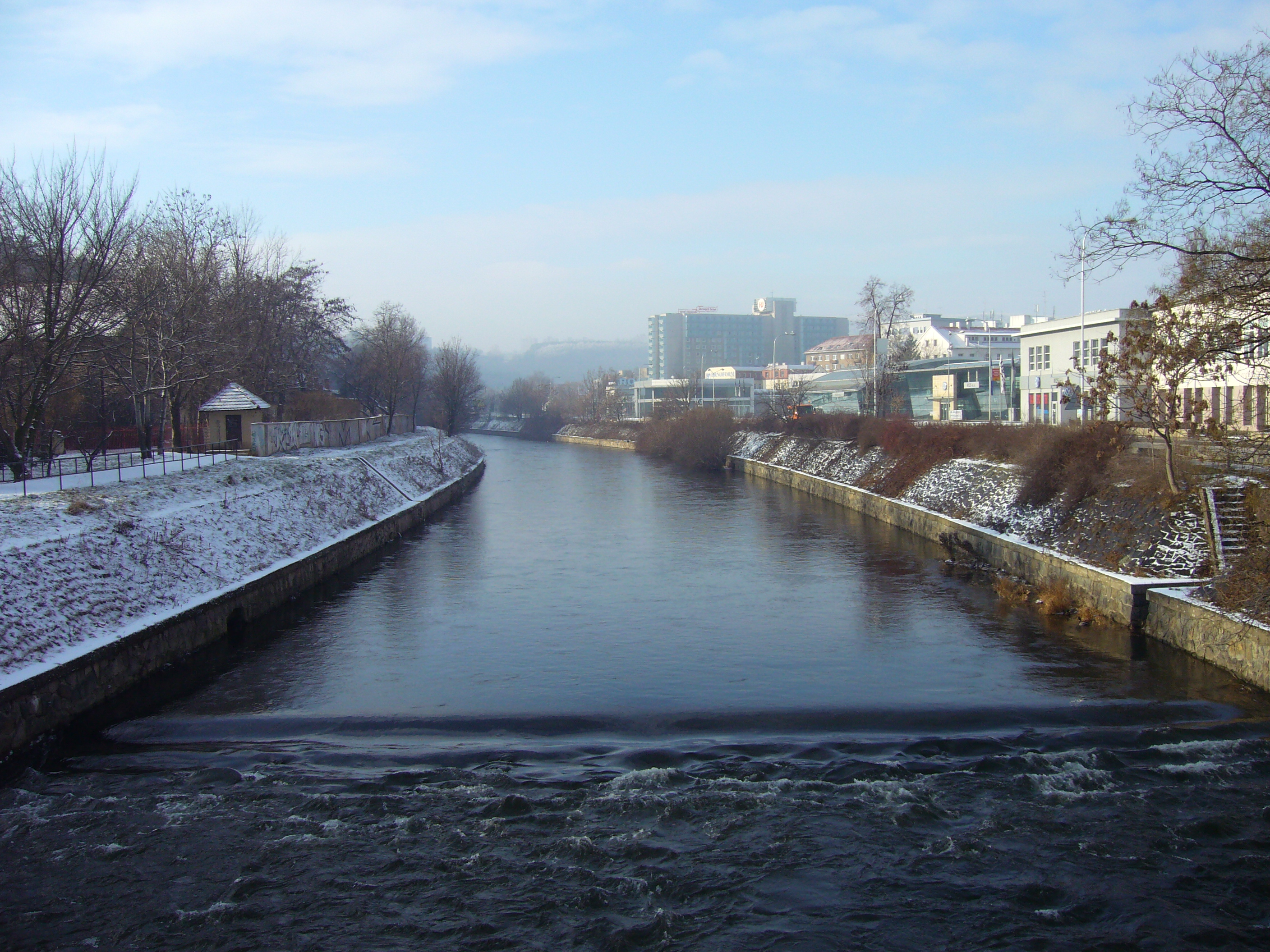 Zimní Svratka u hotelu Voroněž v Brně.